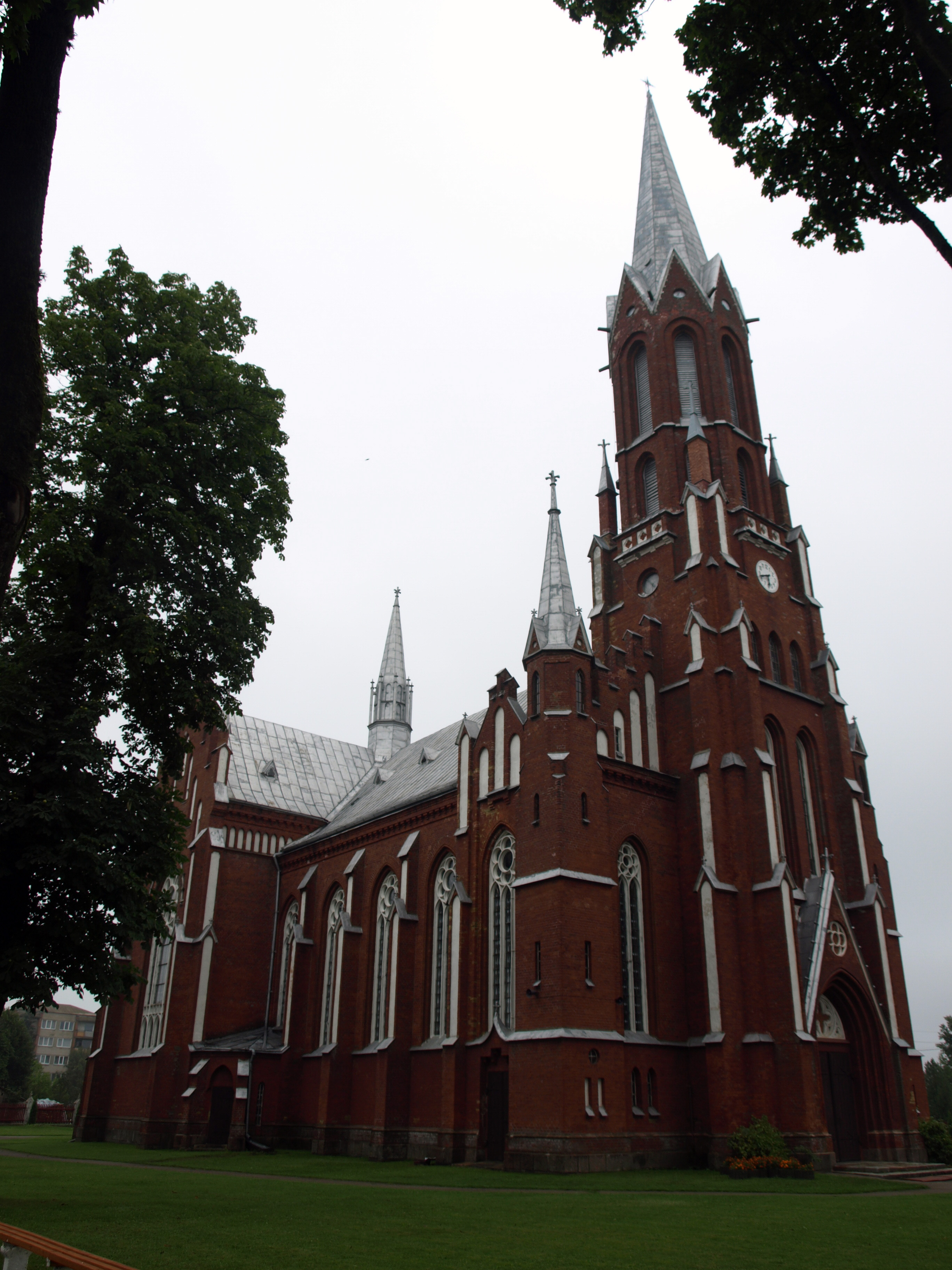 Šilalė church, Šilalė district, Lithuania